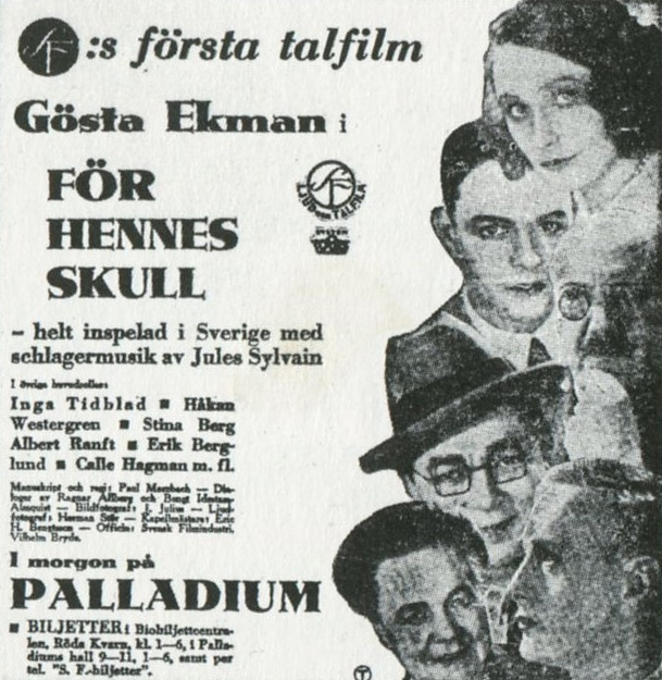 Biografannons för den första svenskproducerade talfilmen 10 augusti 1930 på "Palladium" i Stockholm